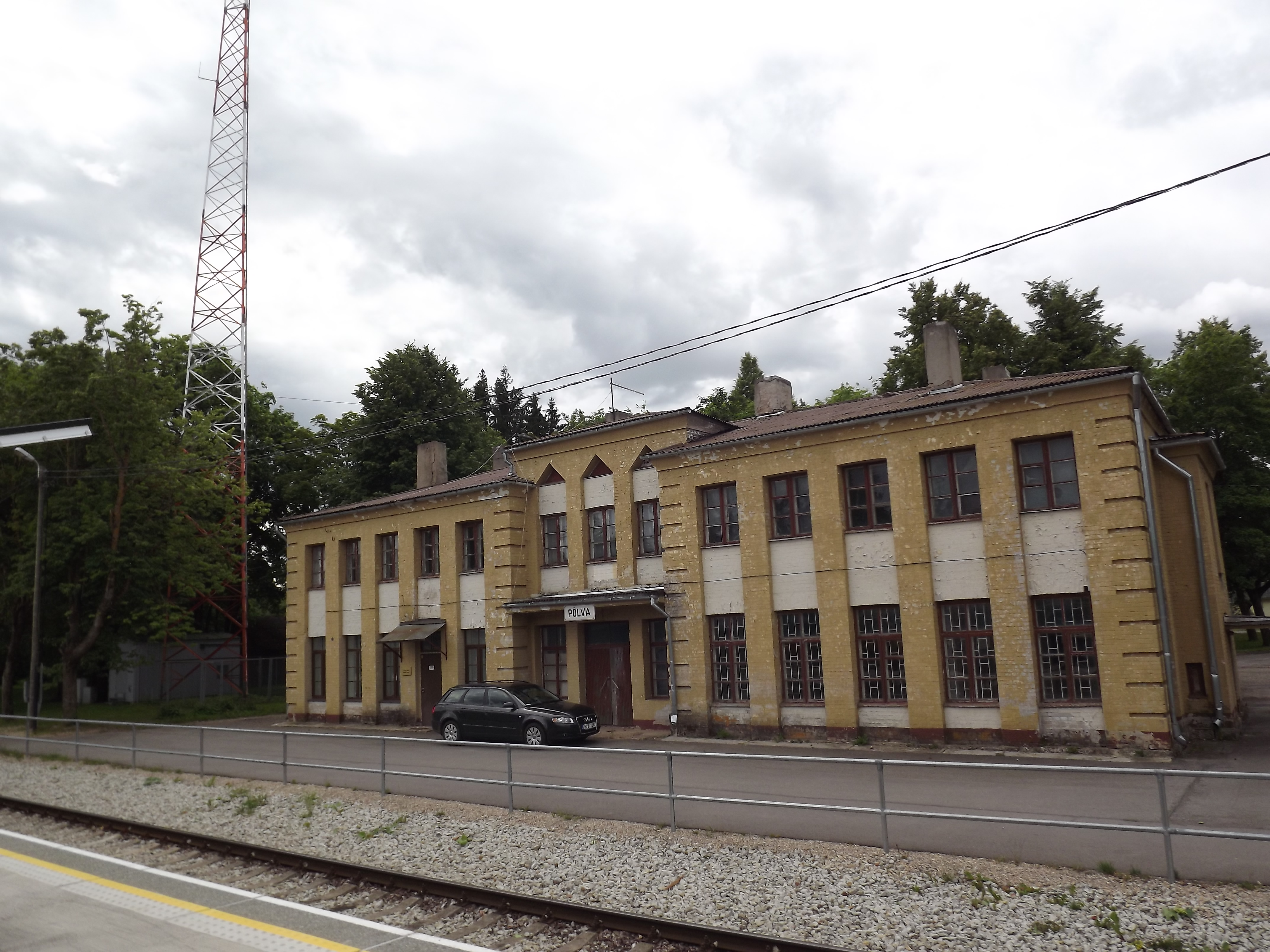 Põlva raudteejaam